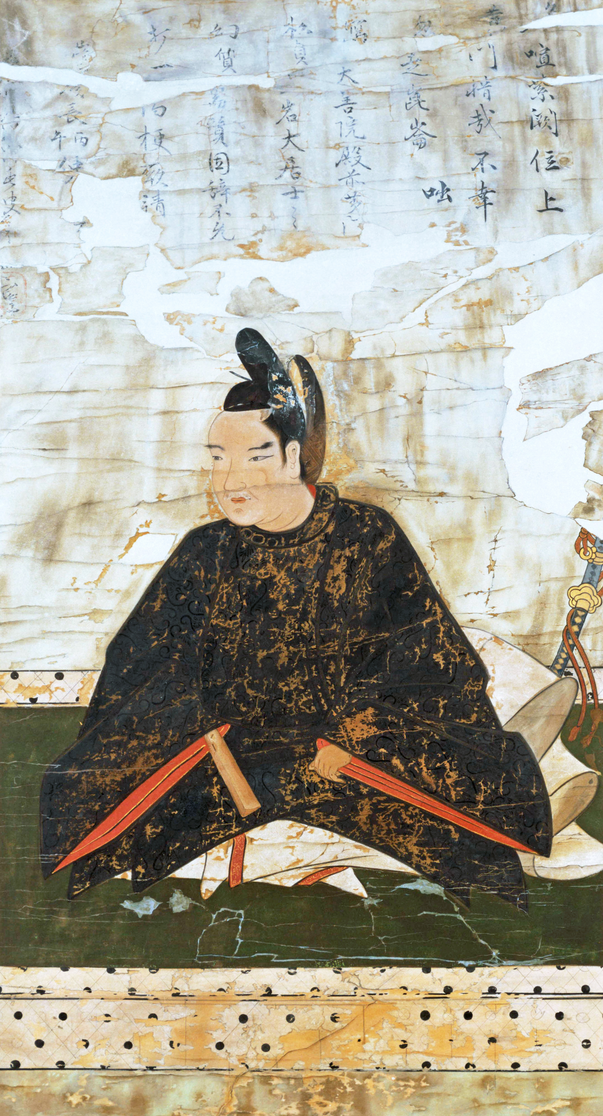 織田秀信像。模写。 原典は滋賀県滋賀郡坂本村来迎寺所蔵で、賛は慶長丙午（1606年）。